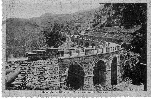 Pont sur le Rio Bagnadori, nommé "du Spessia", en courbe, à huit arcades construit en 1937.